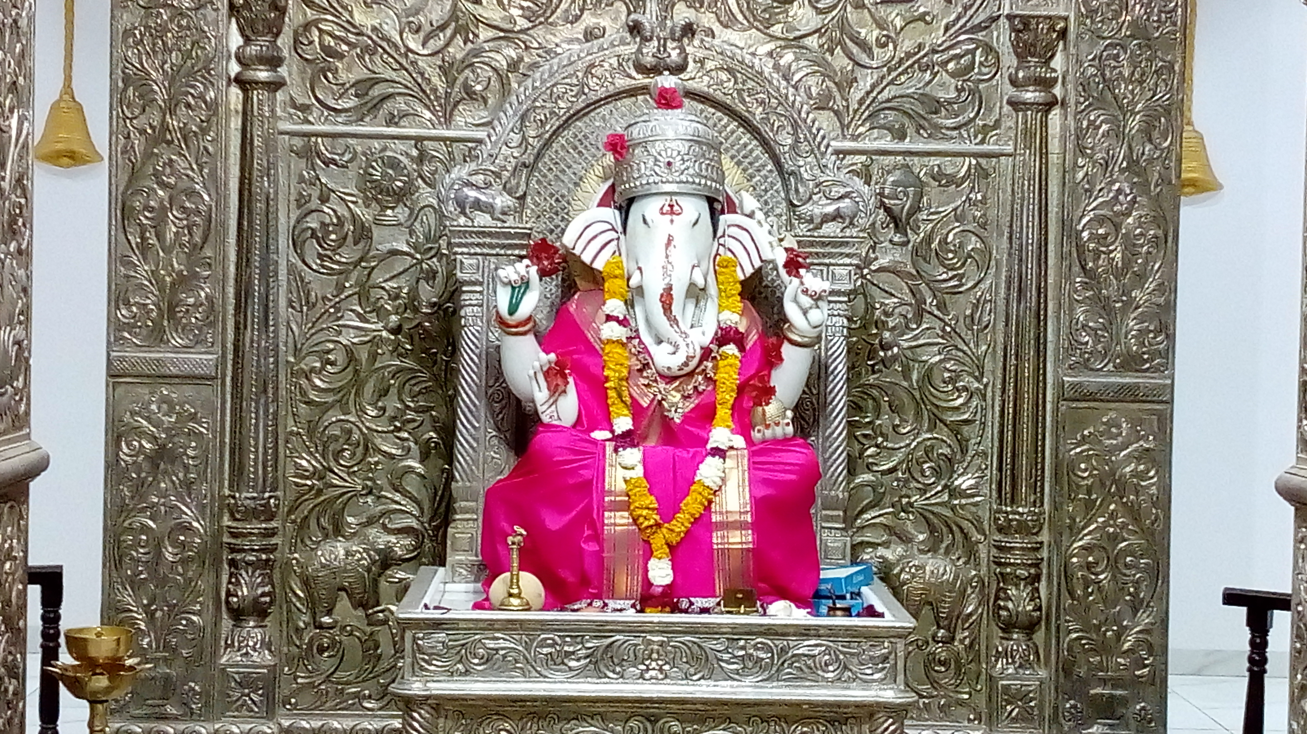 अष्टविनायक मंदिर, लातूर